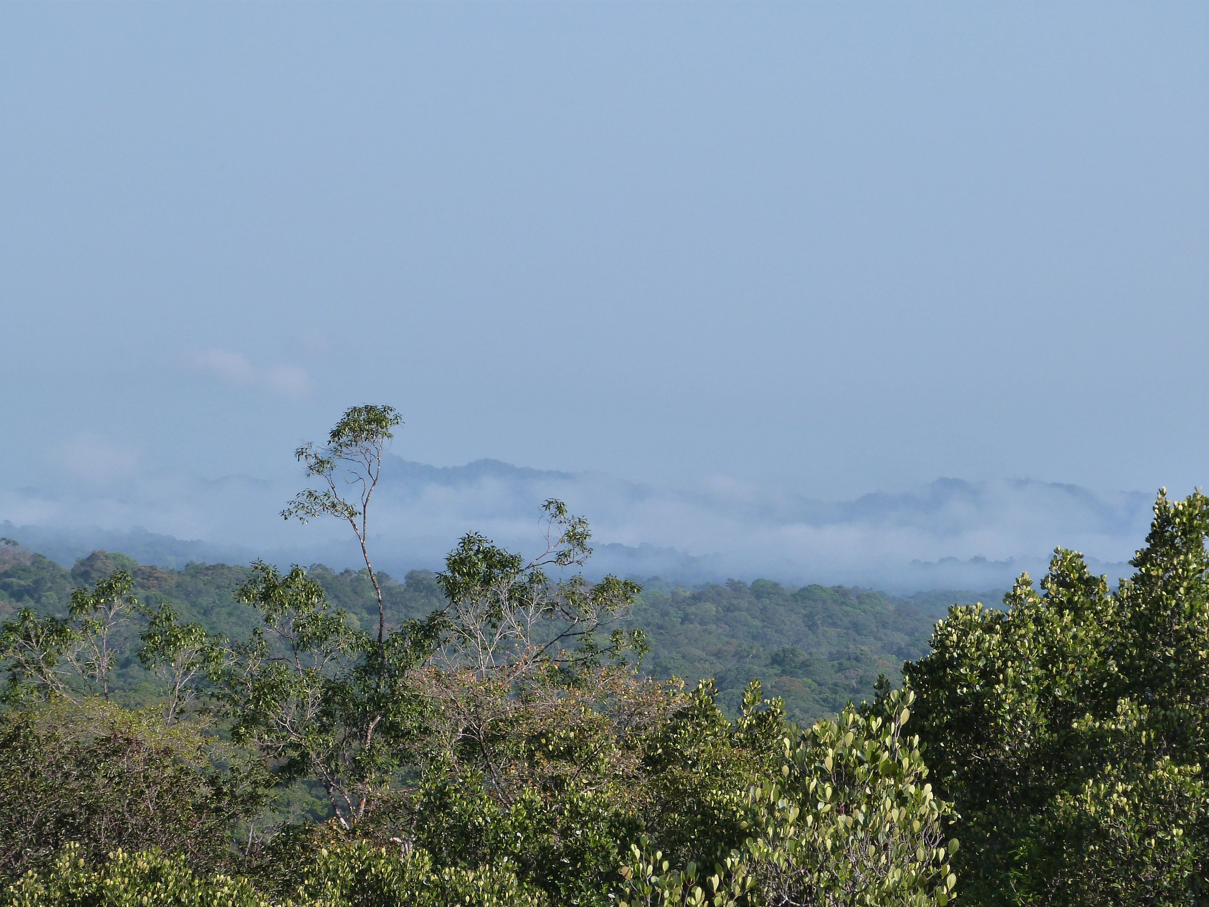 Brume sur la forêt tropicale au petit matin dans le parc naturel régional de guyane